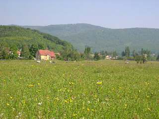 Romagny-sous-Rougemont, paysage avec les Vosges du sud Photo prise le 15 mai 2004 par LP90 Licence GFDL LP90 mai 2004